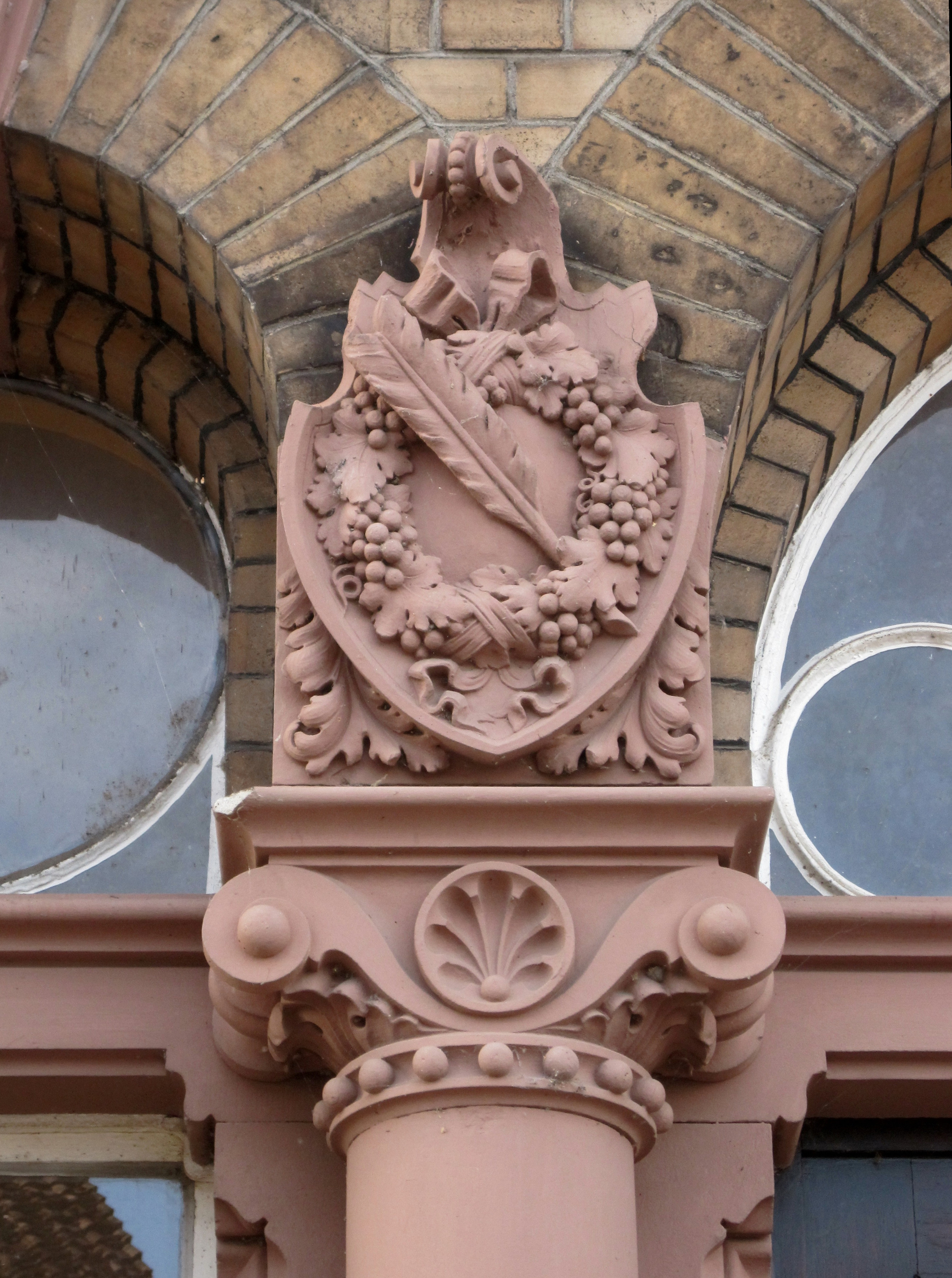 Hattenheimer Wappen am Bahnhof von Hattenheim im Rheingau. Hessen